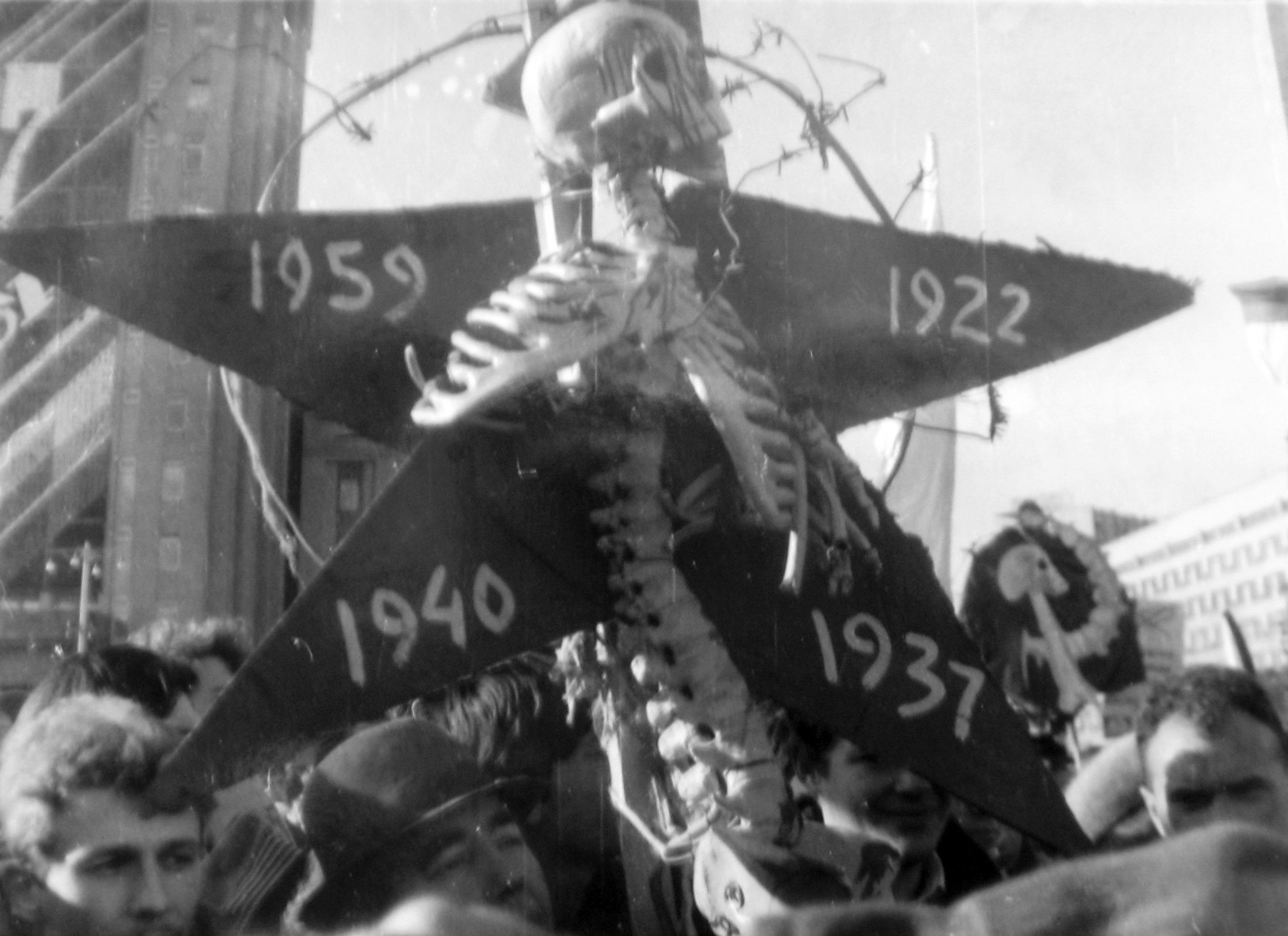 Беларуская (тарашкевіца): Антыкамуністычны митынг 7 лістапада 1990, Менск, пл. Леніна